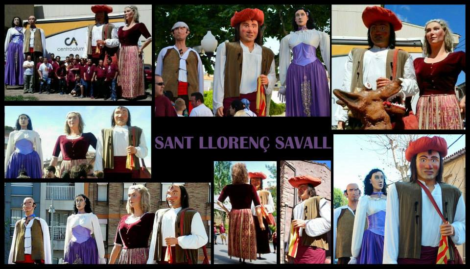 Gegants de Sant Llorenç Savall durant una sortida a Nou Barris.